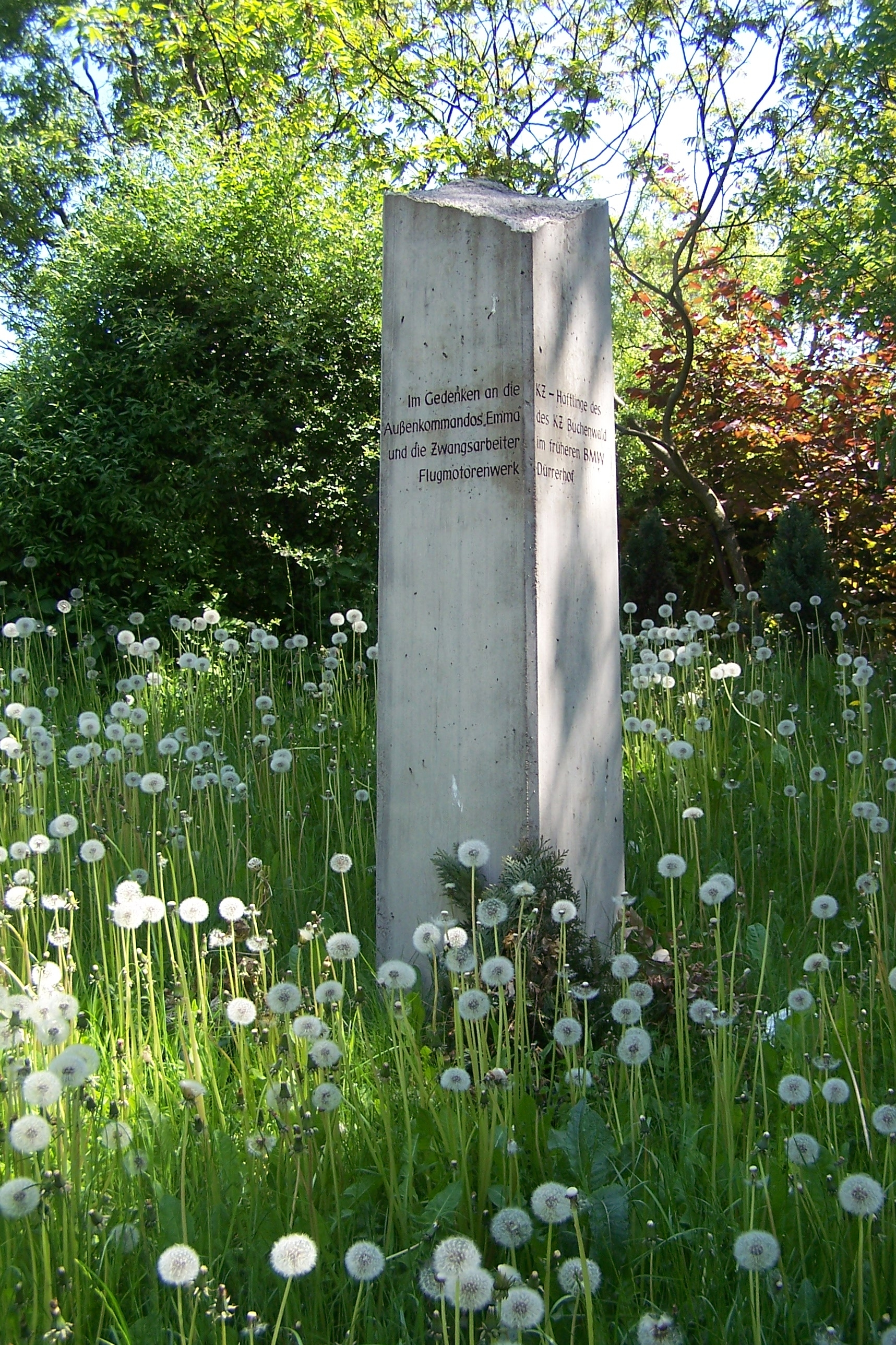 Der Gedenkstein für die Opfer des als KZ-Emma bekannten Lagers im BMW-Flugzeugmotorenwerk Eisenach-Dürrerhof.